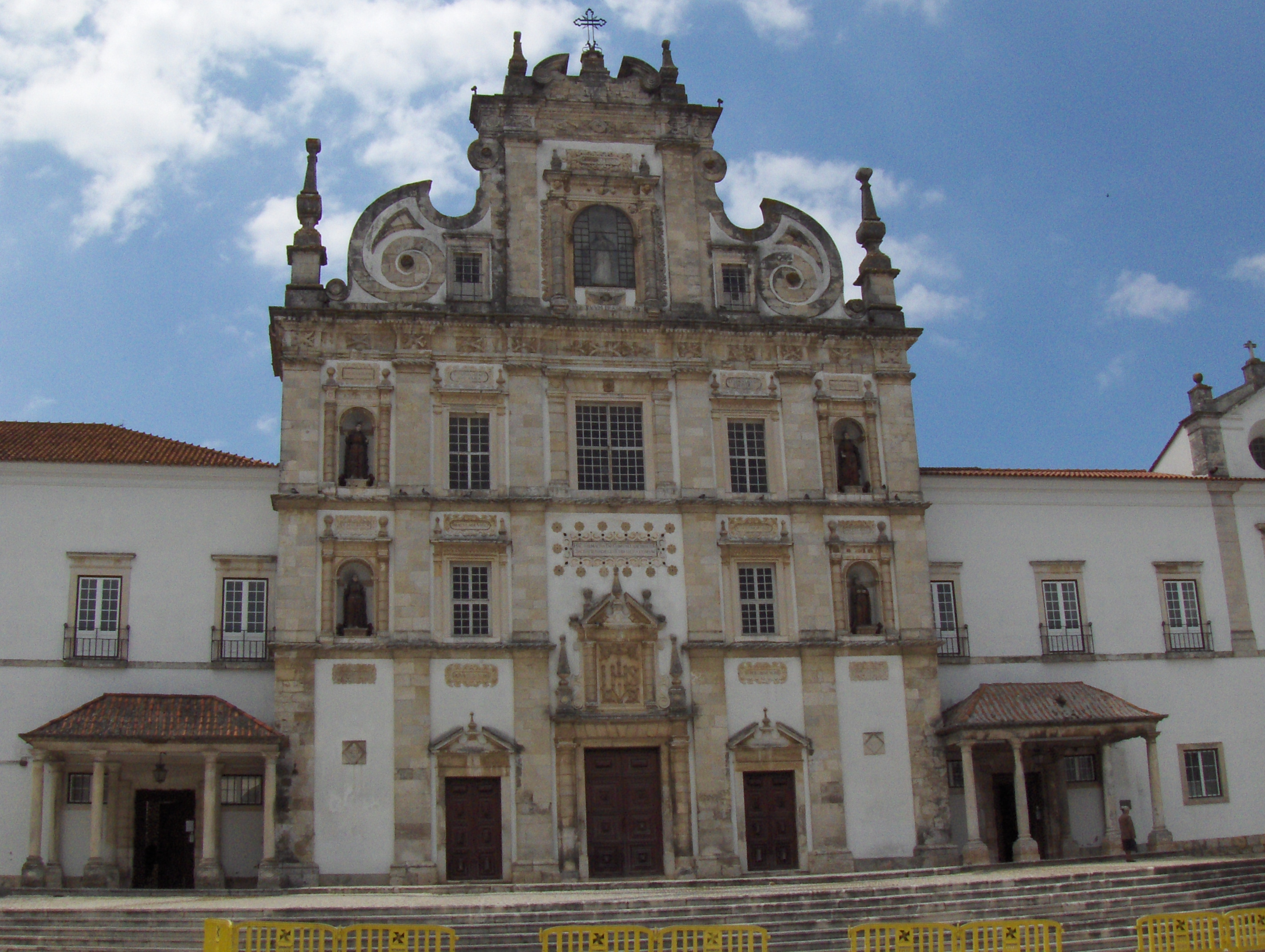 Igreja de Nossa Senhora da Conceição do Colégio dos Jesuítas This file was uploaded for Wiki Loves Monuments in Portugal with the unique identifier 69798.